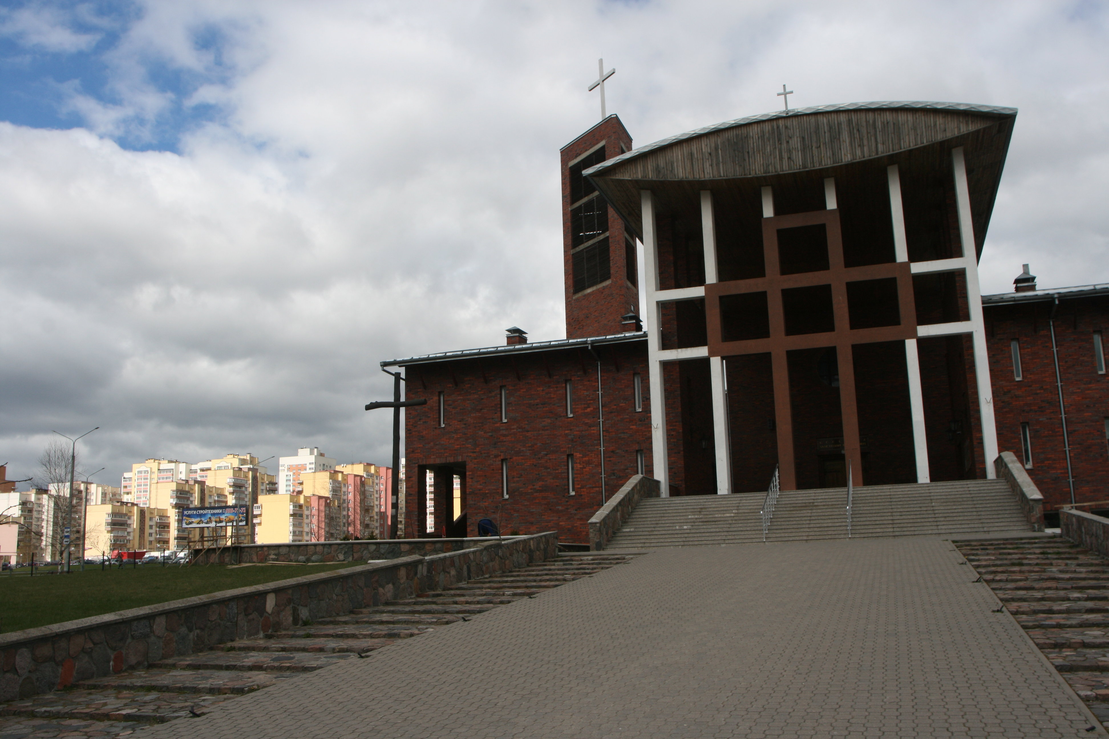 Дзевятоўка-5, Гродна, Belarus